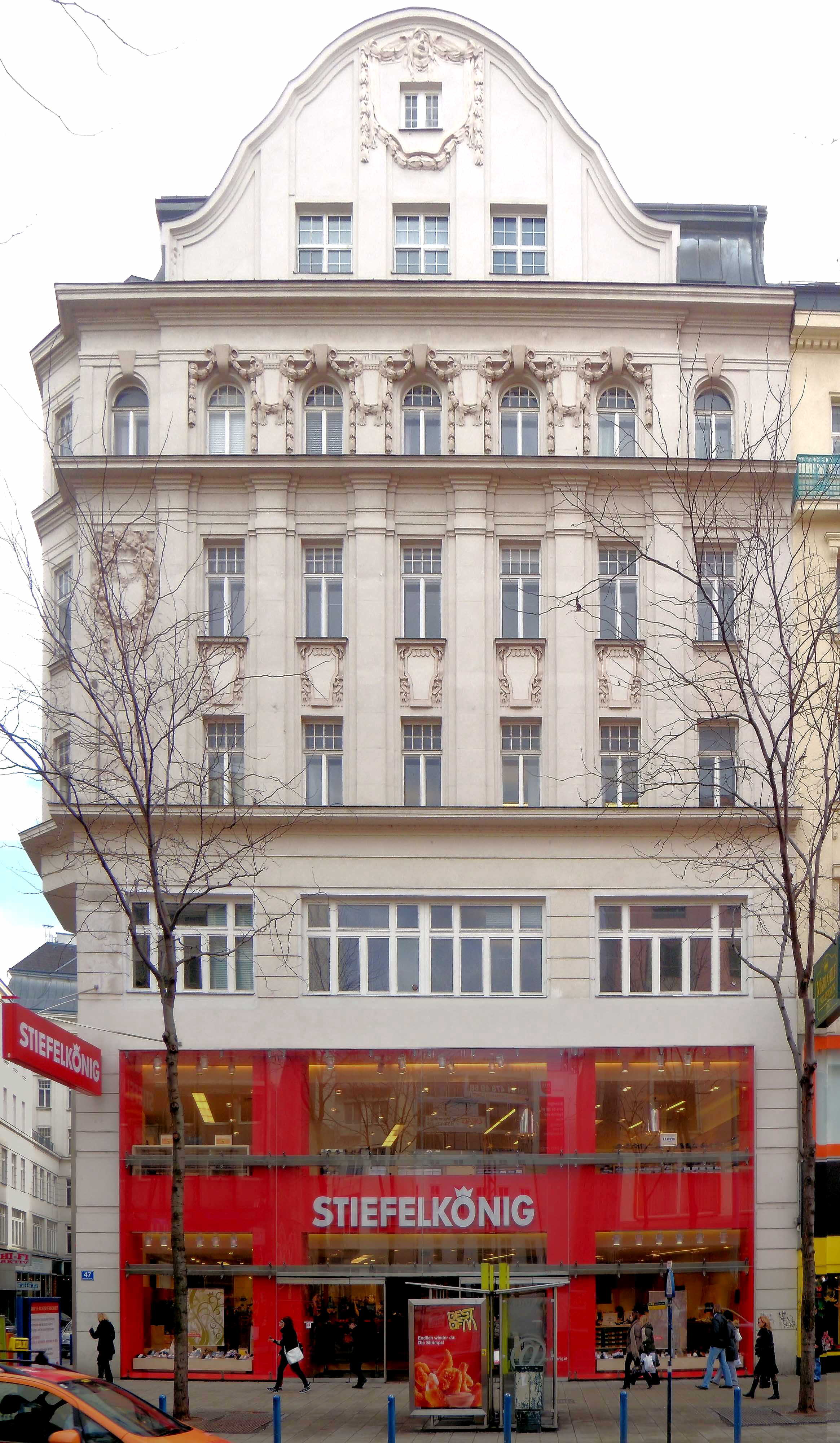 Wien-Mariahilf, Mariahilferstraße 47, 1060 Wien, Österreich